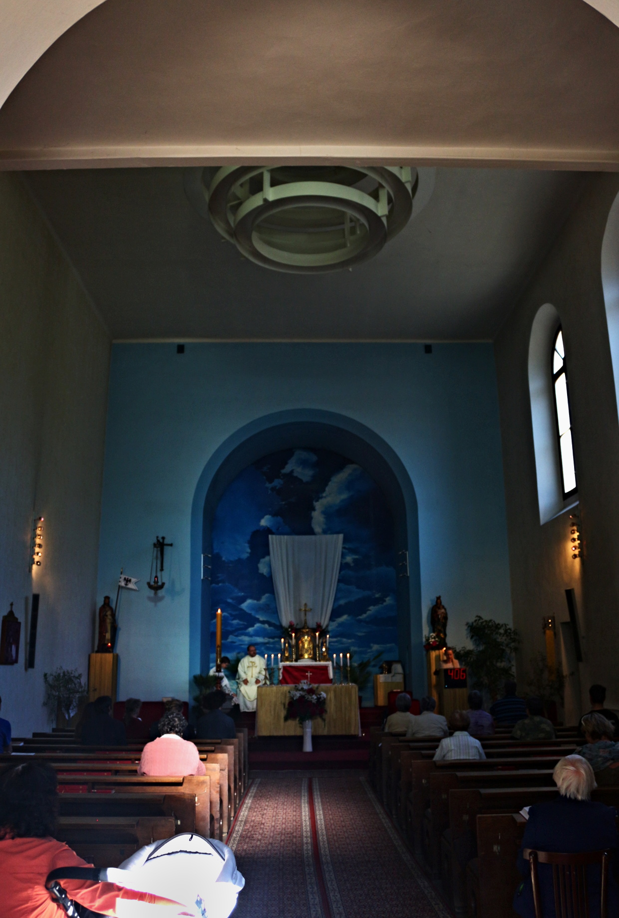 Kostel sv. Václava v Nuslích